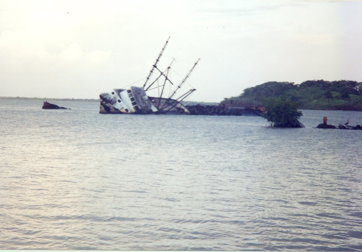 eines von vielen Wracks an der Küste von Bluefields (hier El Bluff), Nicaragua